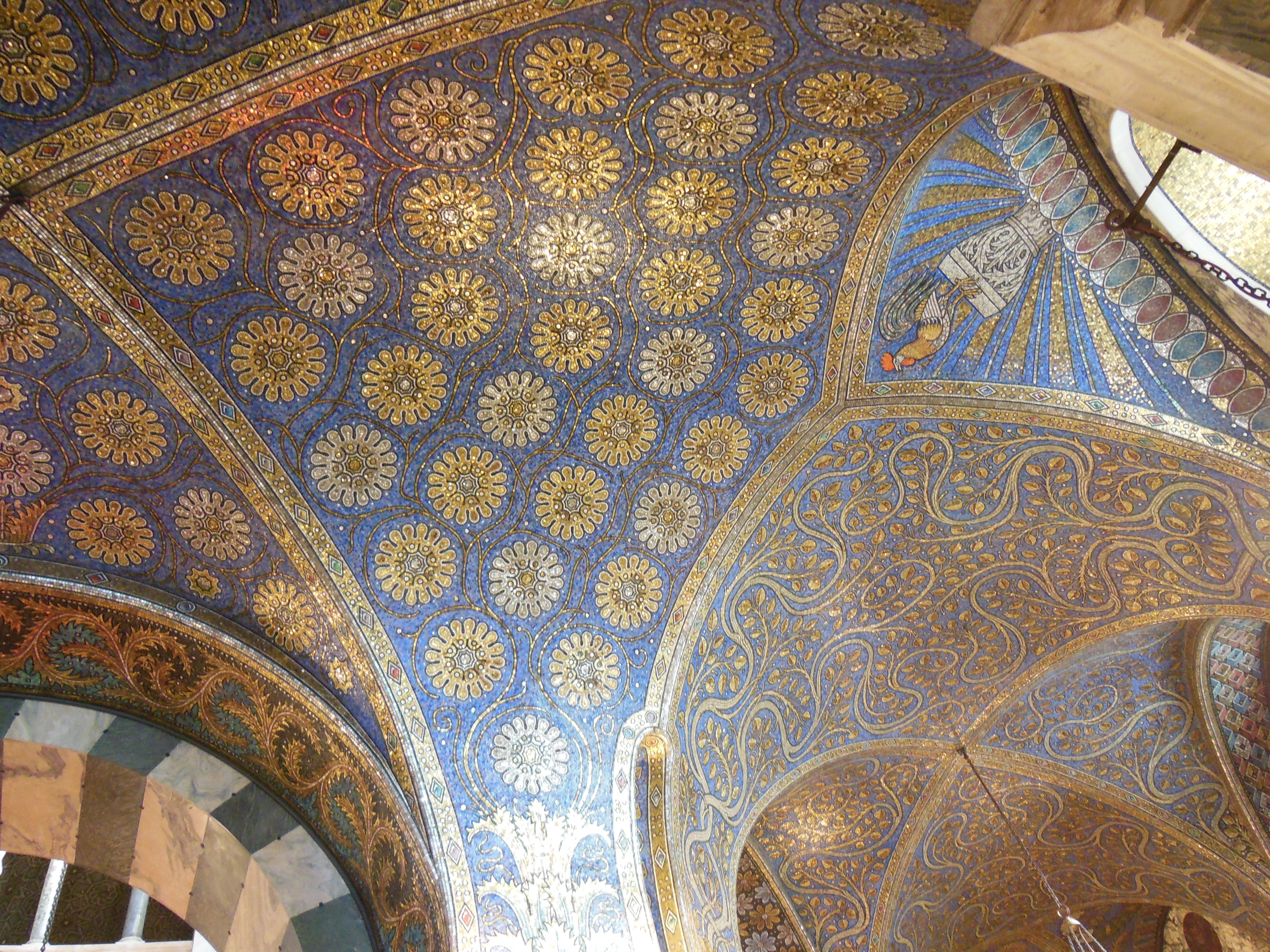 Pompás mennyezeti díszítés